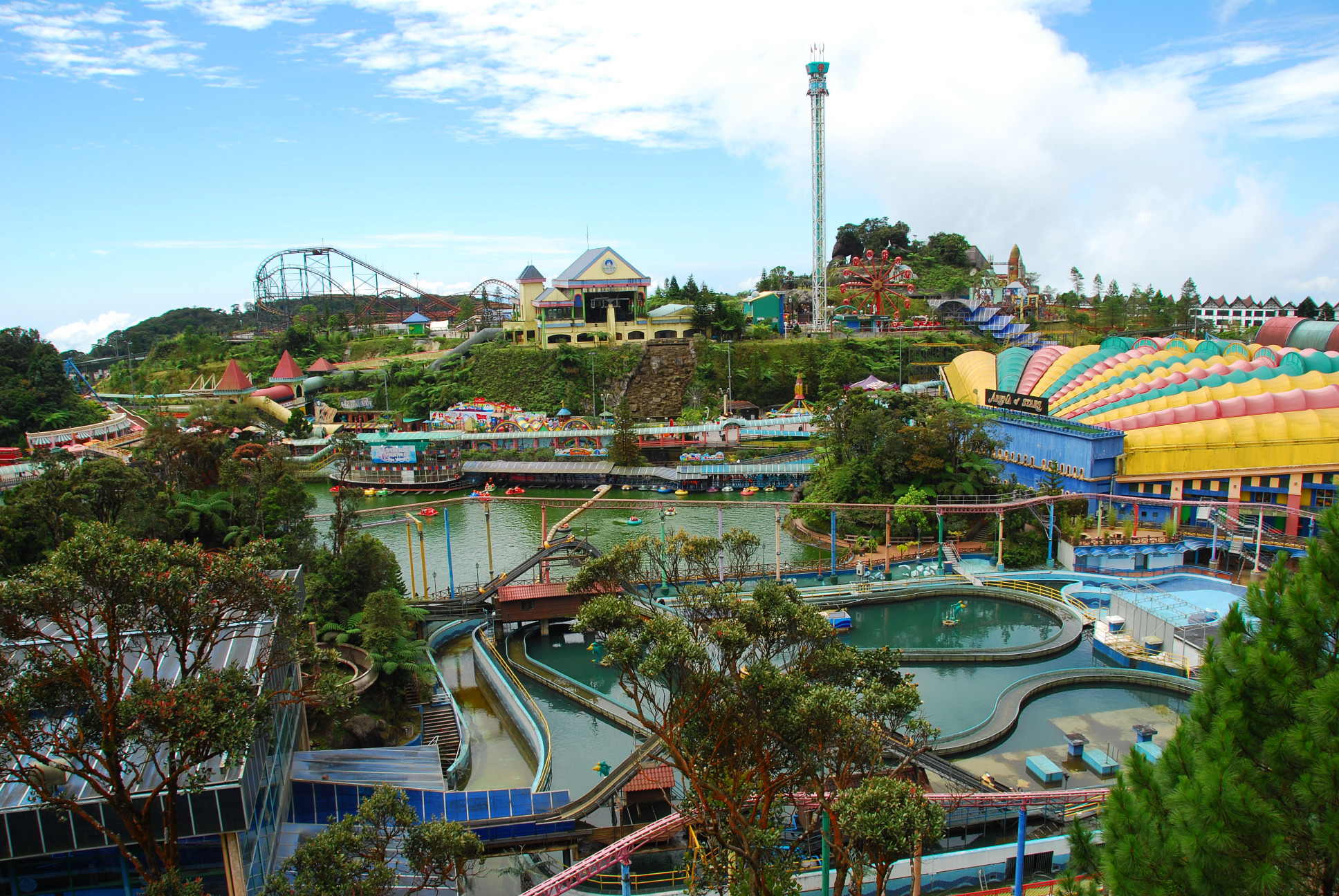 Genting Highlands, 69000 Genting Highlands, Pahang, Malaysia